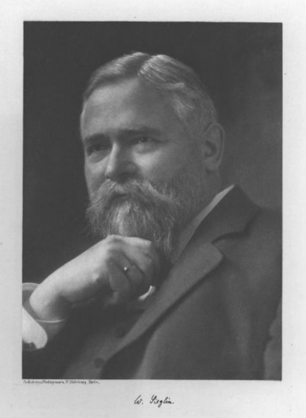 = Porträt Wilhelm Sieglin, Foto: Rudolf Dührkoop, vor 1918